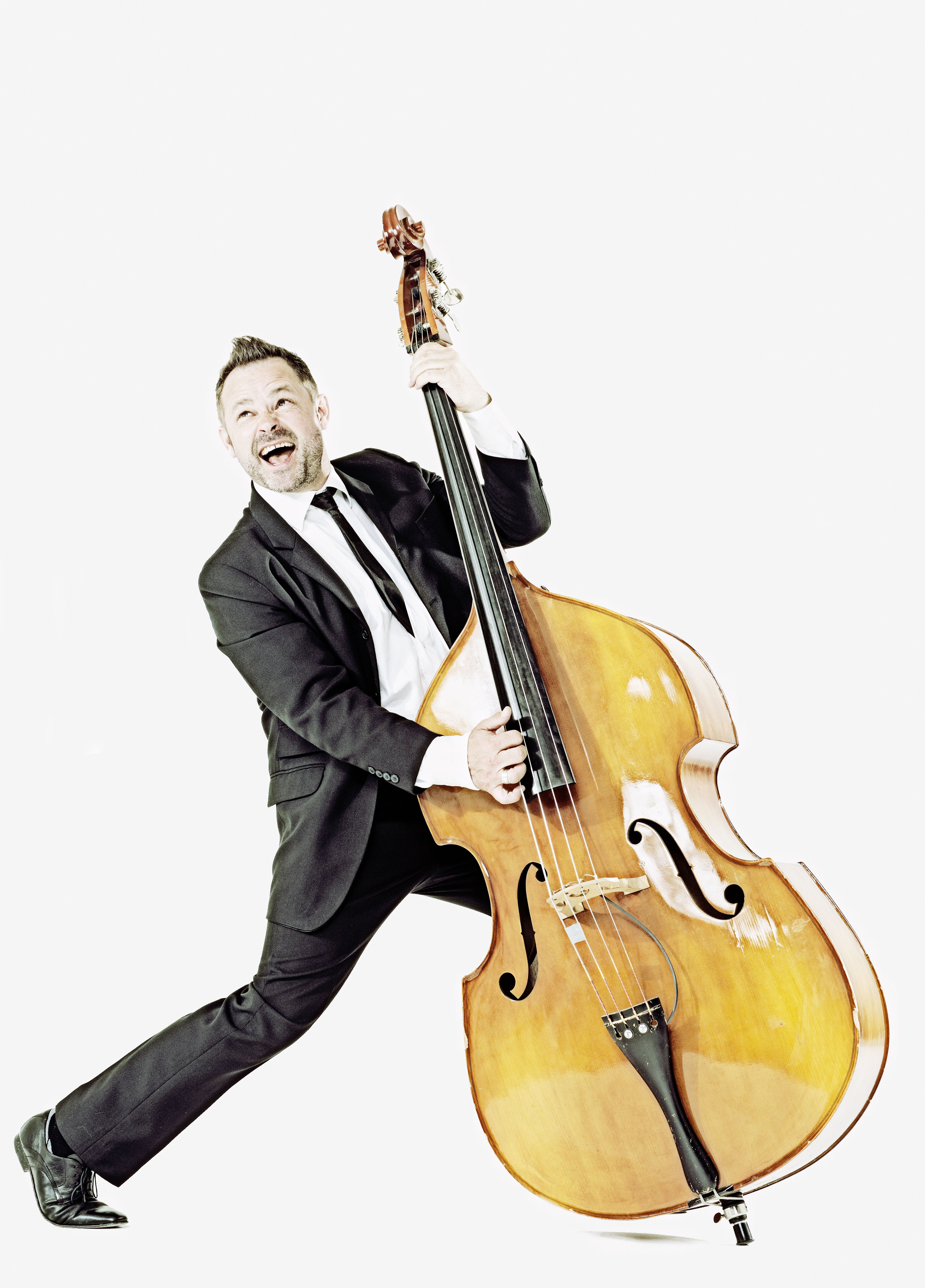 Mek Pek startede med at spille gulvbas i "Hounddog allstars" 1983. Spiller Gulvbas i "Mek Pek & The Debitors" og Mek Pek's Åh Abe trio"